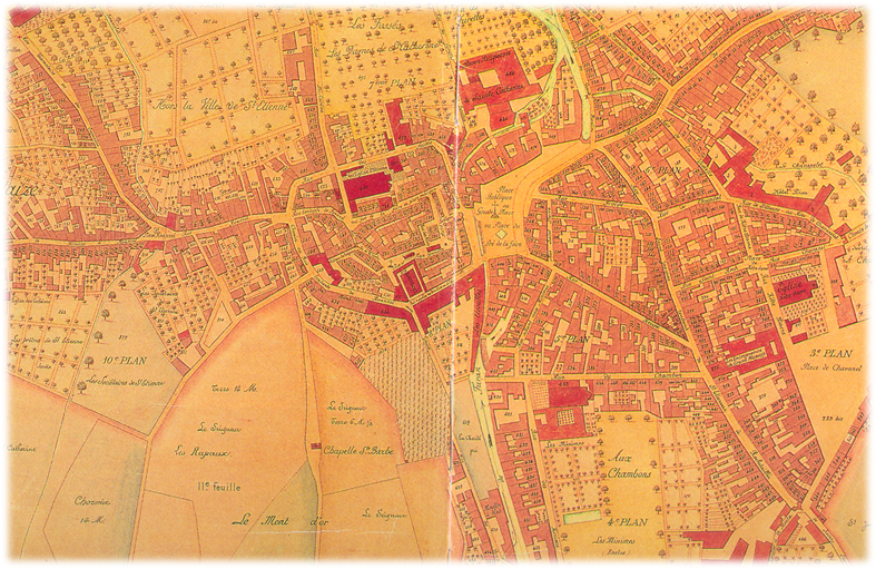 détail du plan de Saint-Etienne ( Fr, 42) de 1773